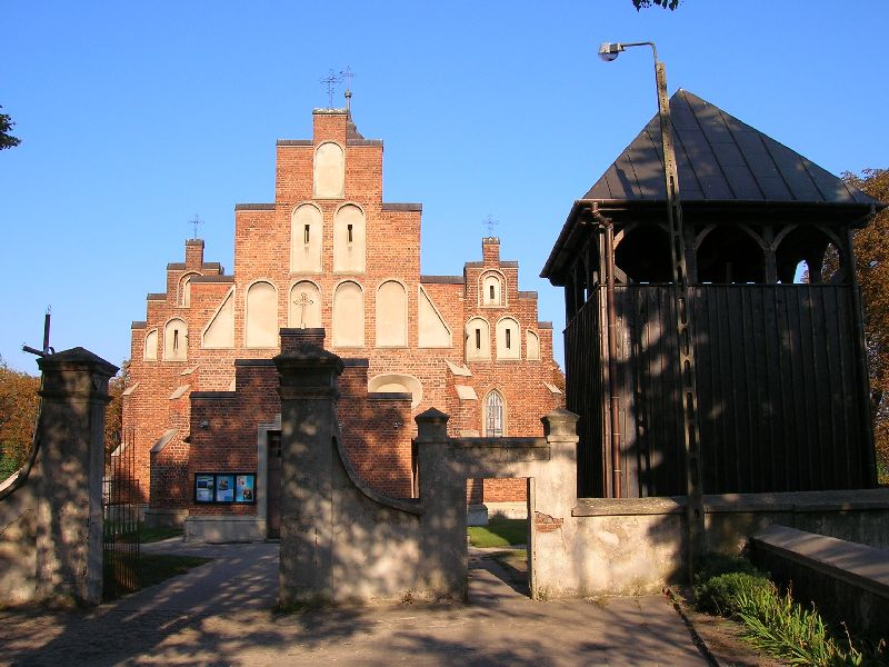 Kościół Świętgo Augustyna w Bratoszewicach.